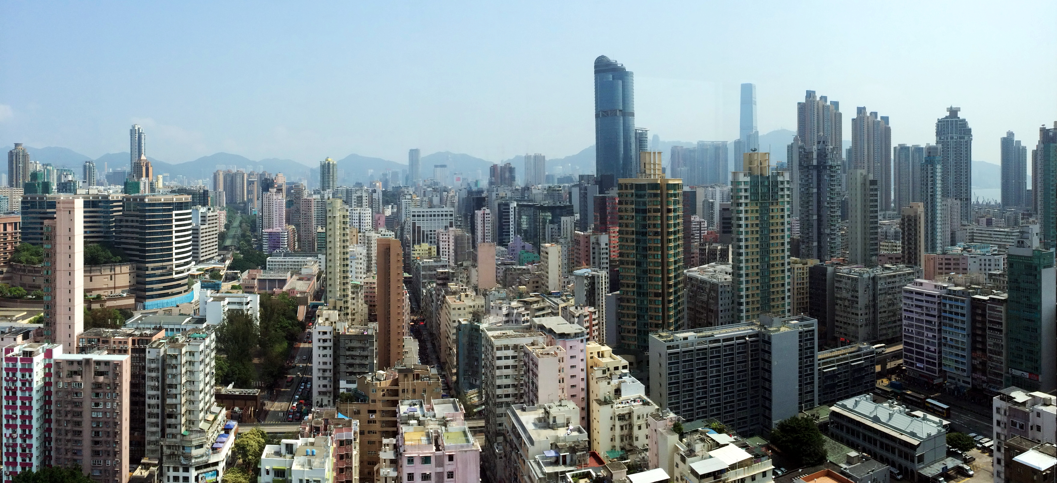 Mong Kok Pano